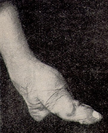 Beispiel für das Füßebinden